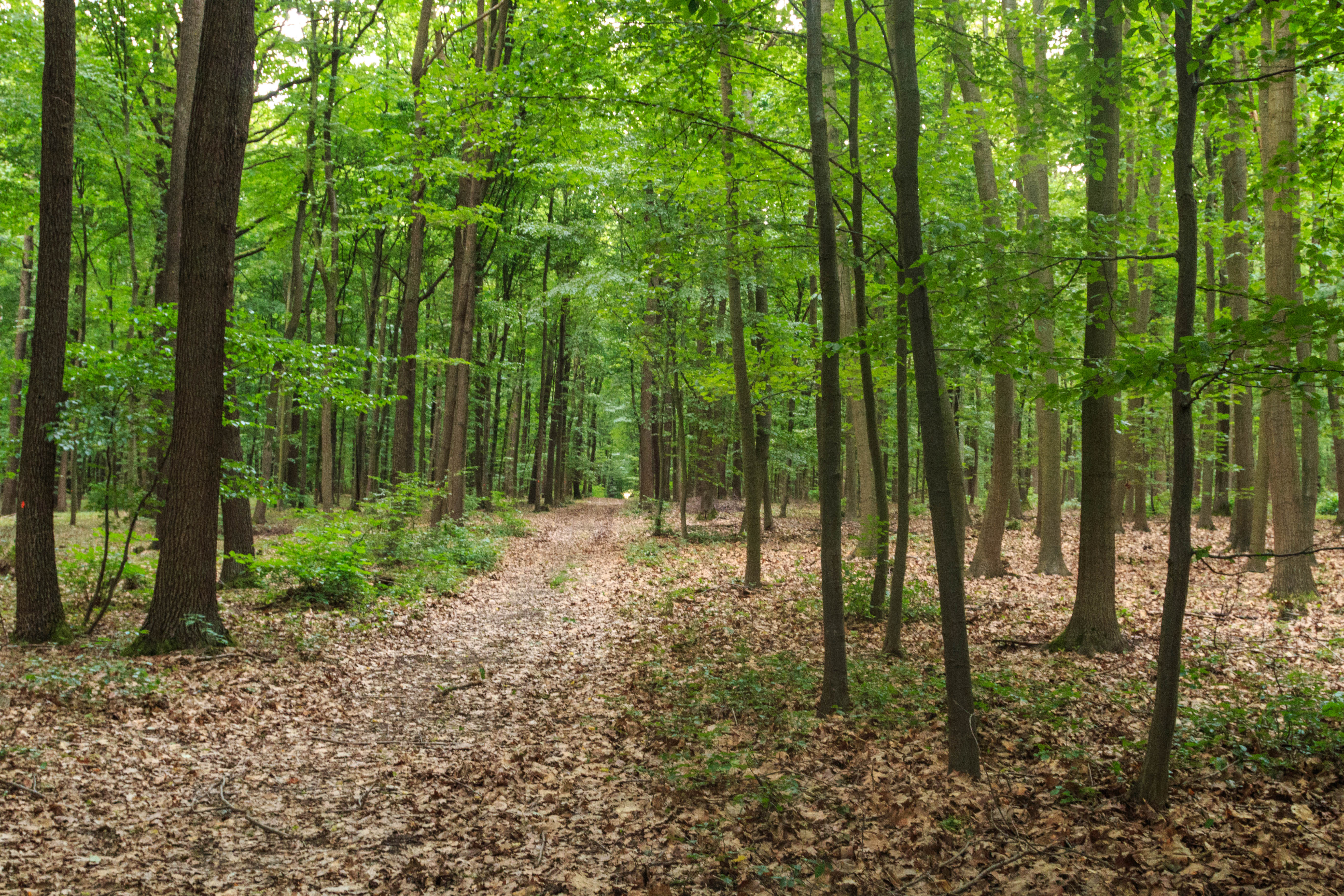 PP Víno Project: Chráněná území.